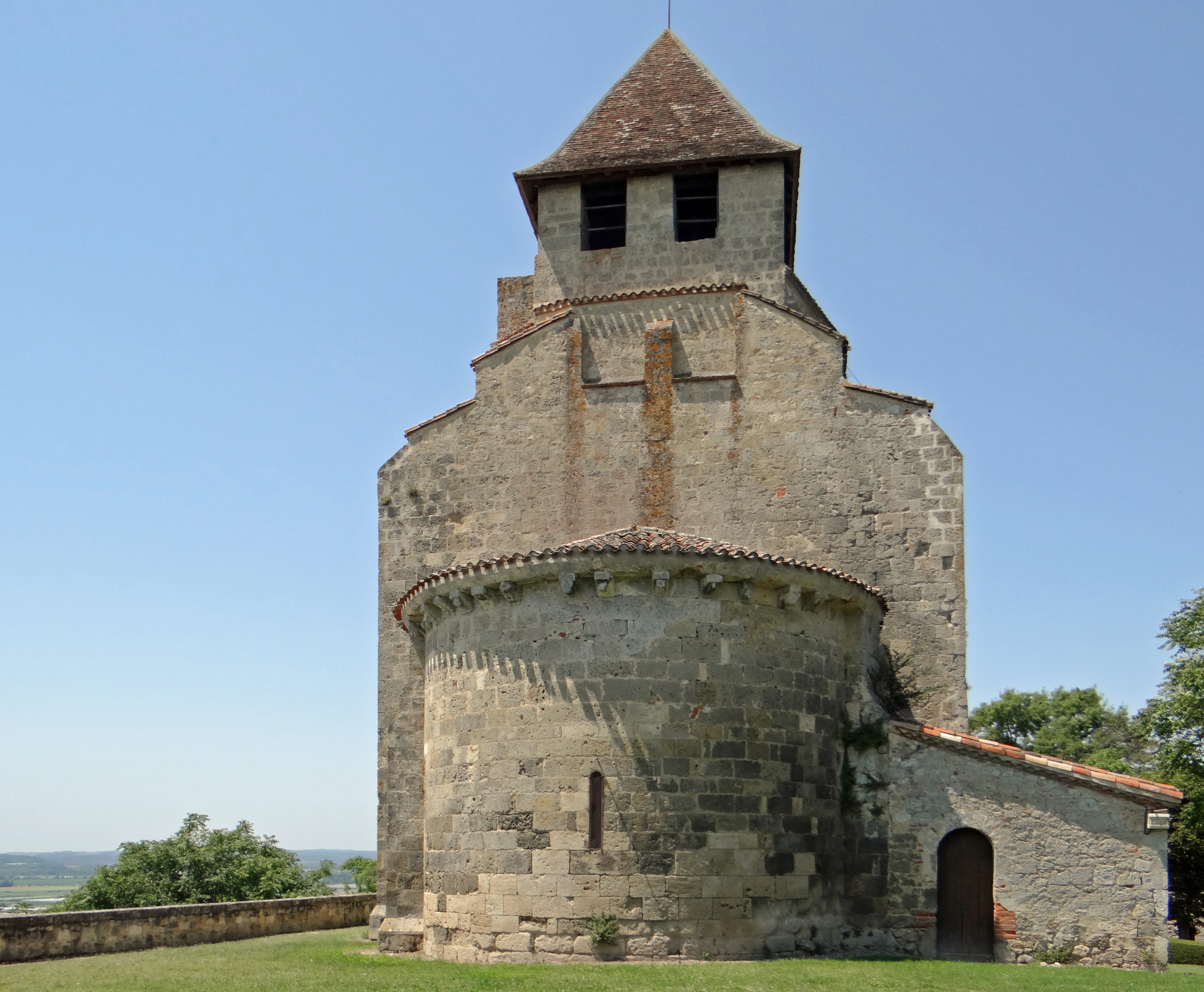 Clermont-Dessous - Église Saint-Jean-Baptiste - L'église dominant la plaine de la Garonne